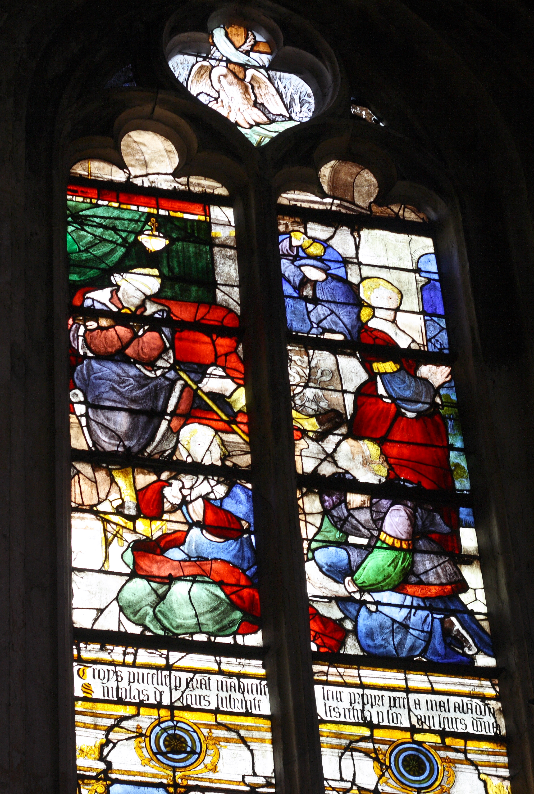 Katholische Pfarrkirche Saint-Martin in Herblay, einer Gemeinde im Département Val d'Oise (Île de France), Bleiglasfenster von 1537 mit Szenen der Legende des hl. Nikolaus (oben) (Ausschnitt)